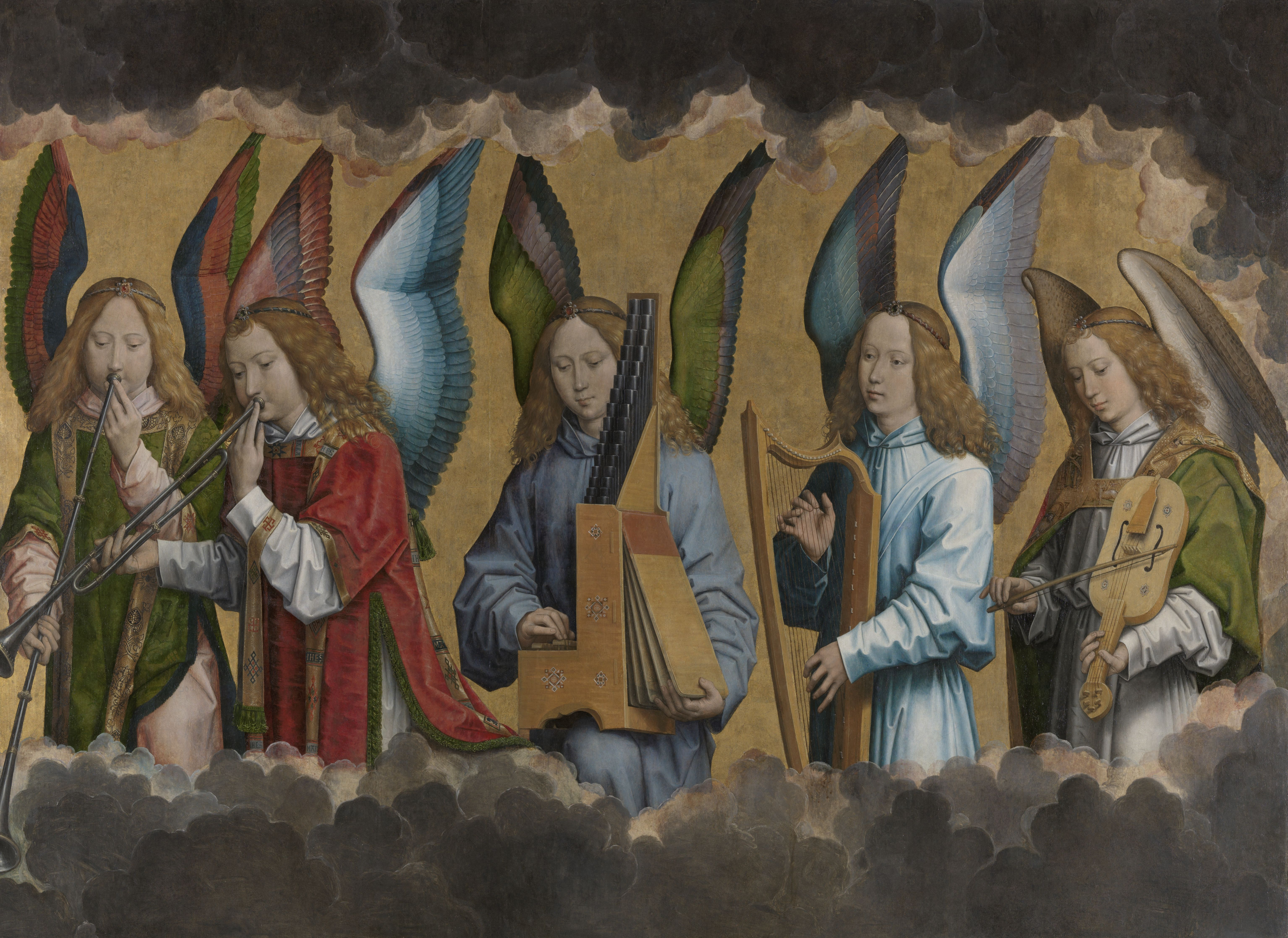 schilderij ( Hans Memling( koninklijk museum voor schone kunsten antwerpen